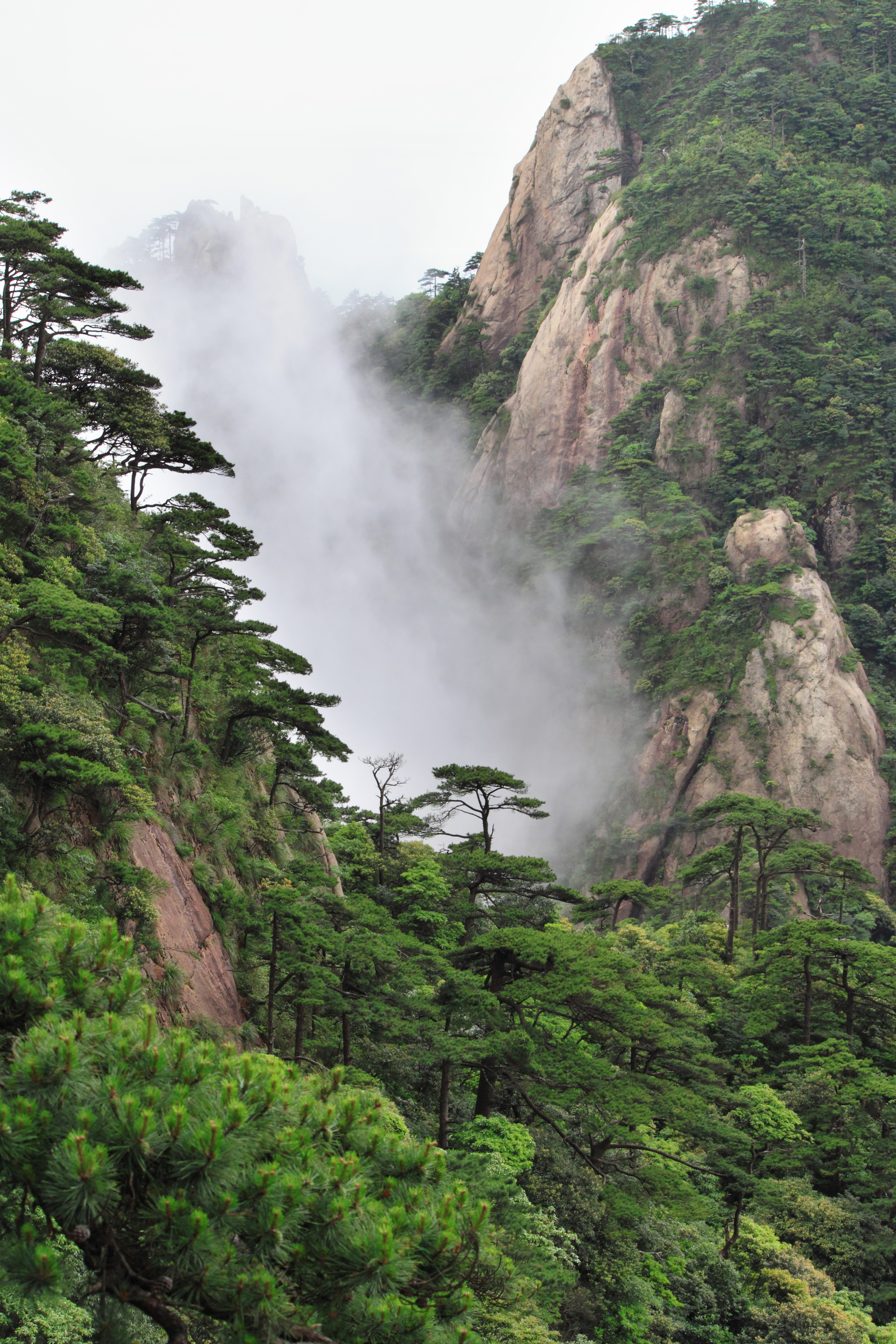 三清山 ——摄于西海岸